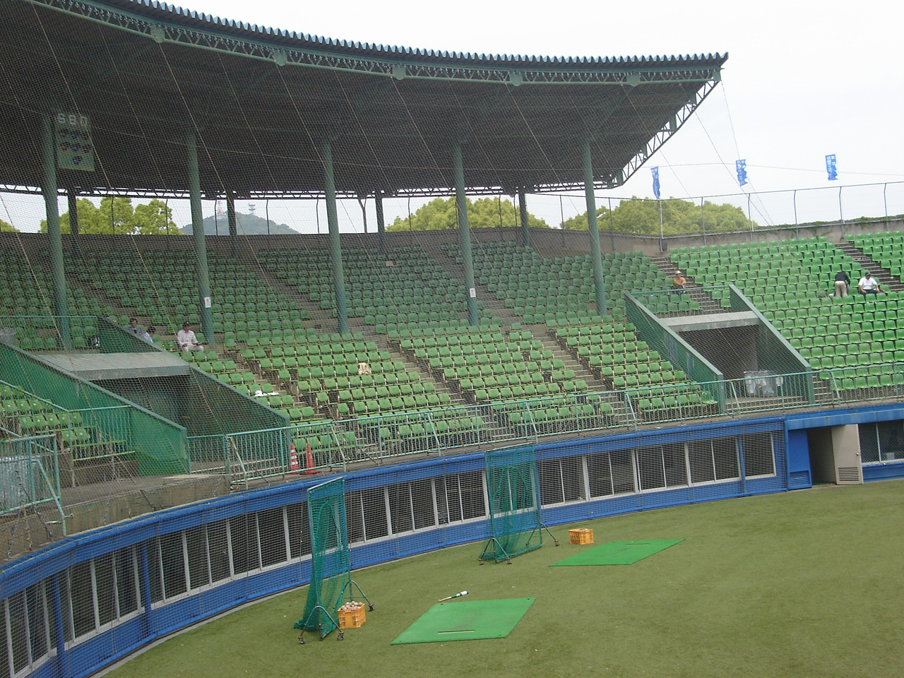 高知県立春野運動公園野球場。 - 日本国高知県春野町にある野球場。